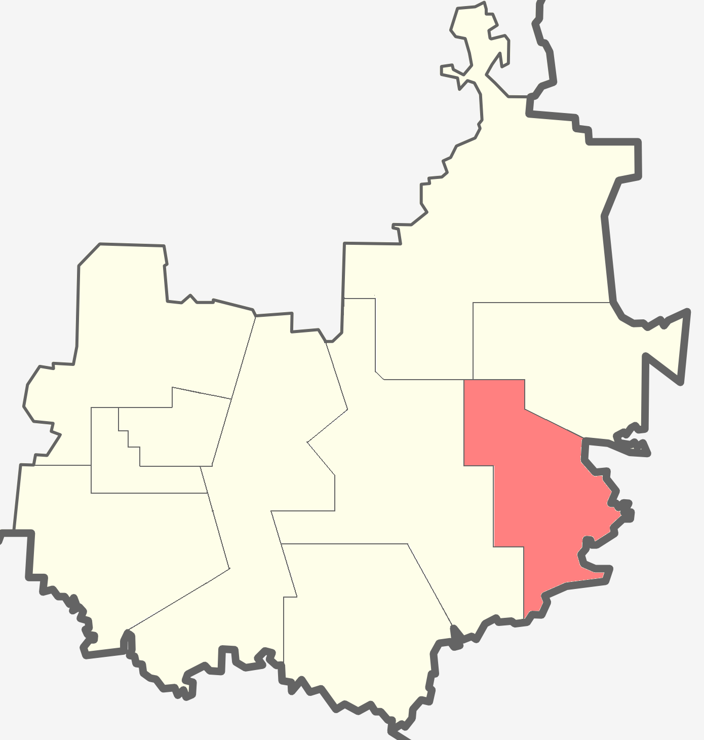 Подборовское сельское поселение на карте Бокситогорского района Ленинградской области.